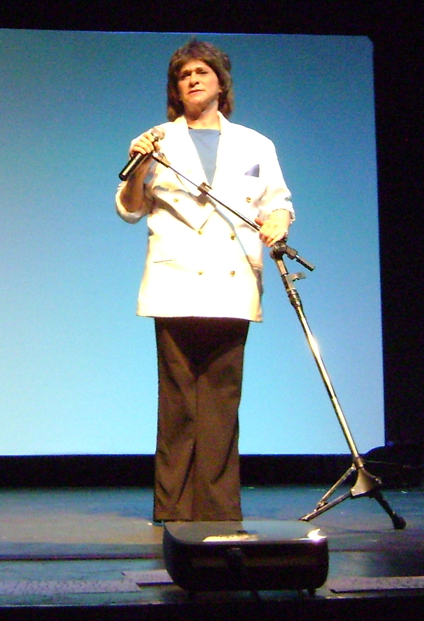 Fafy Siqueira, humorista brasileira, imitando o cantor brasileiro Roberto Carlos no espetáculo "Doremifafy", em São Paulo.